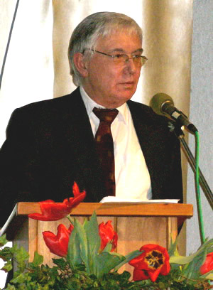 Roland Haug in Stuttgart-Rotenberg im Februar 2005